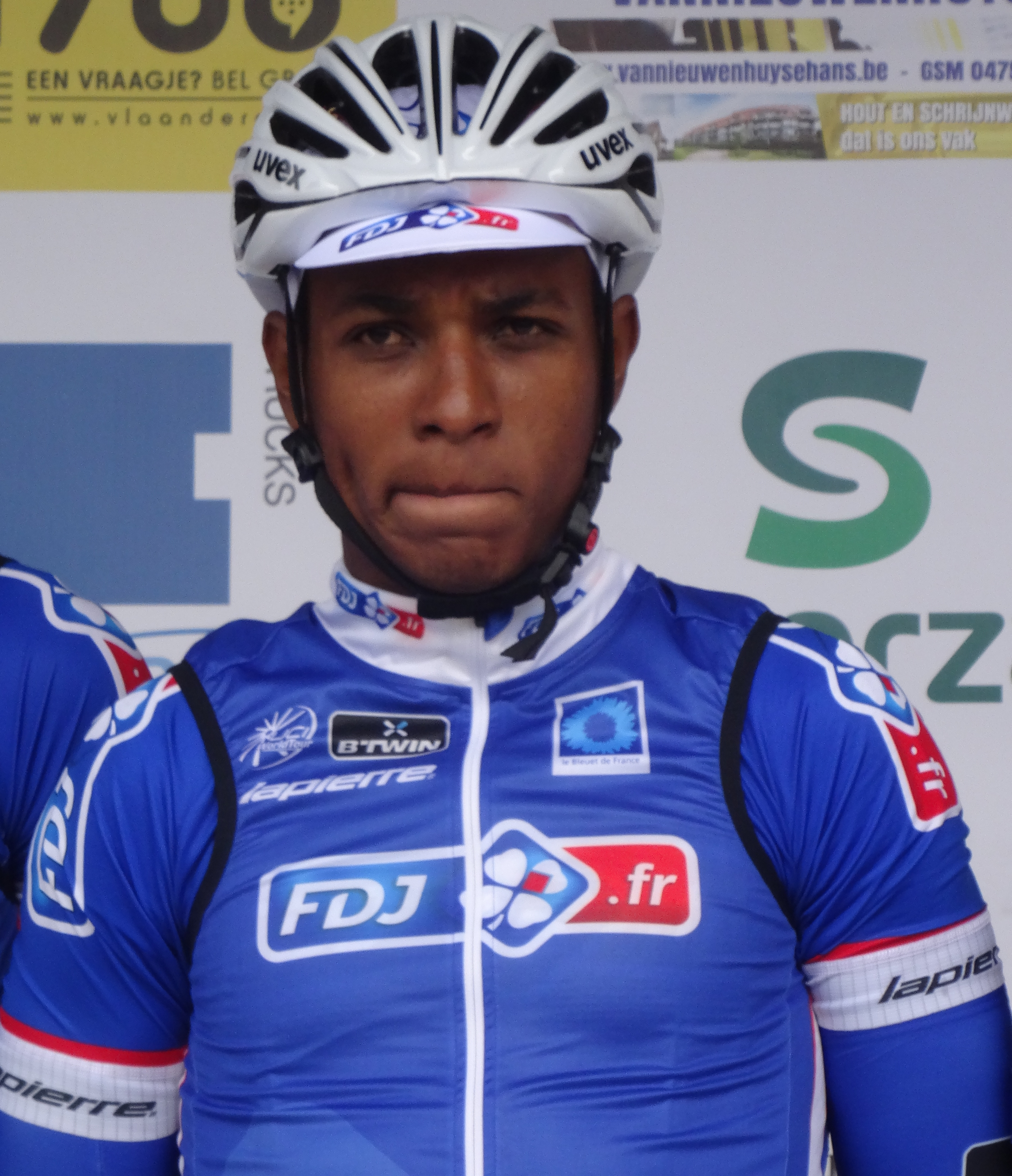 Reportage photographique réalisé le mercredi 24 septembre à l'occasion du départ et du début de la course du Circuit du Houtland 2014 à Lichtervelde, Belgique.